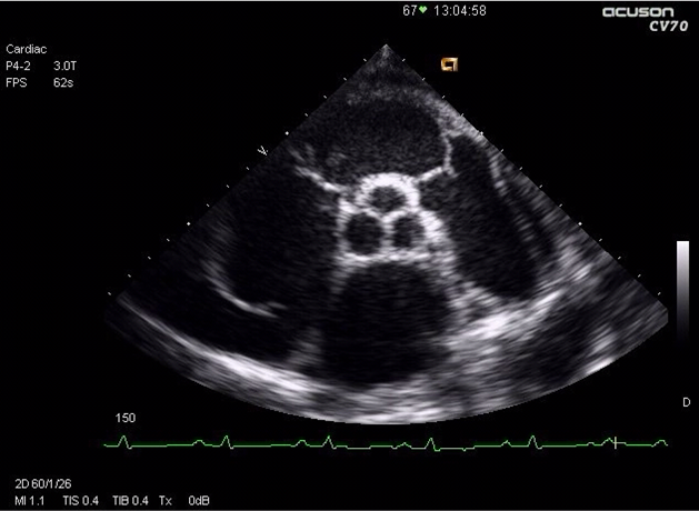 PSAX Aortenklappe